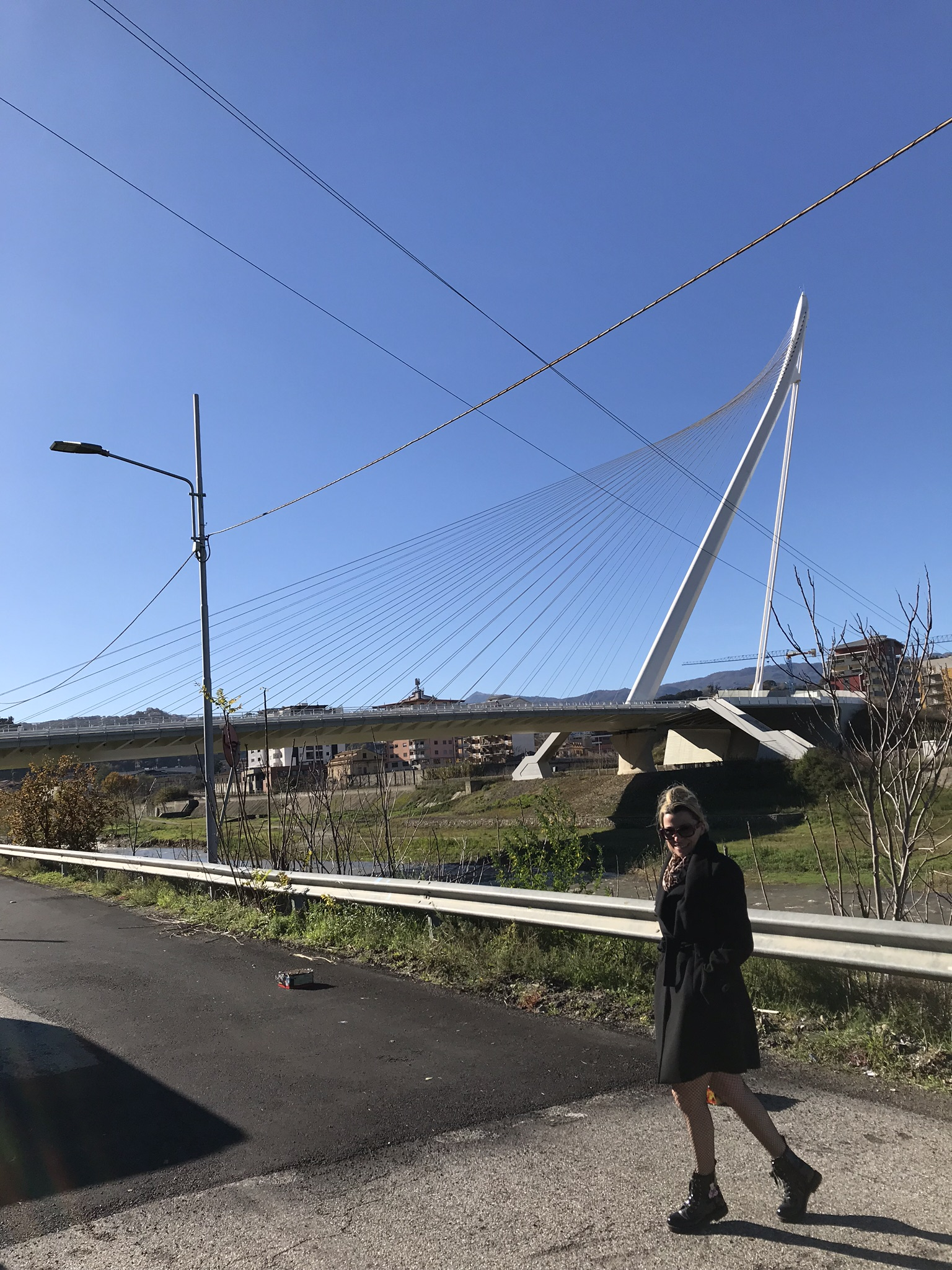 San Francesco di Paola Bridge in Cosenza